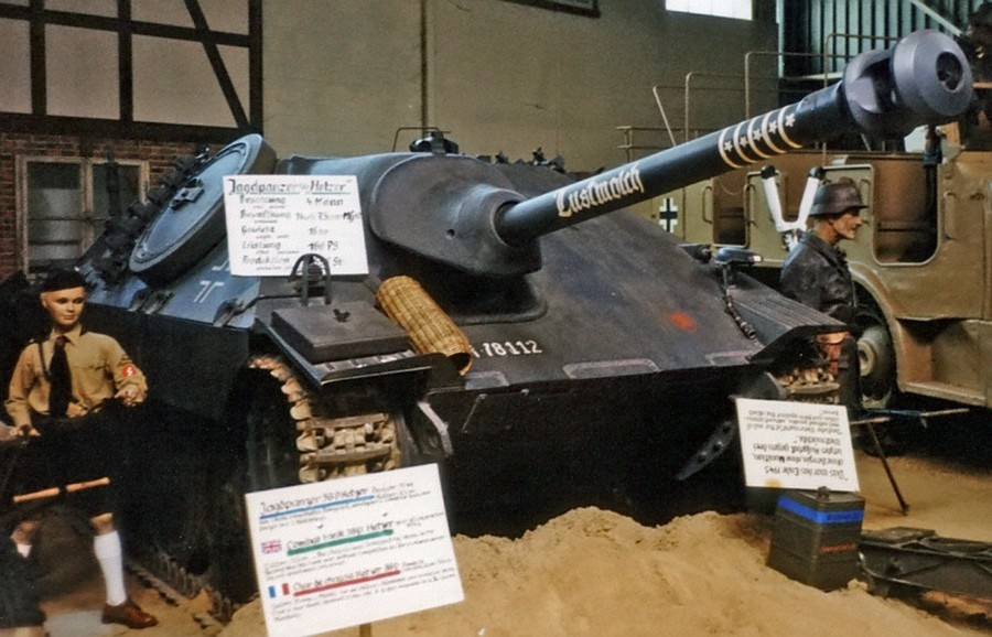 Jagdpanzer 38 (t) Hetzer (höchstwahrscheinlich aber eher die Schweizer Version G-13)